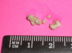 Дакриолиты - слезные камни, удаленные во время оперативного вмешательства на слезных каналах